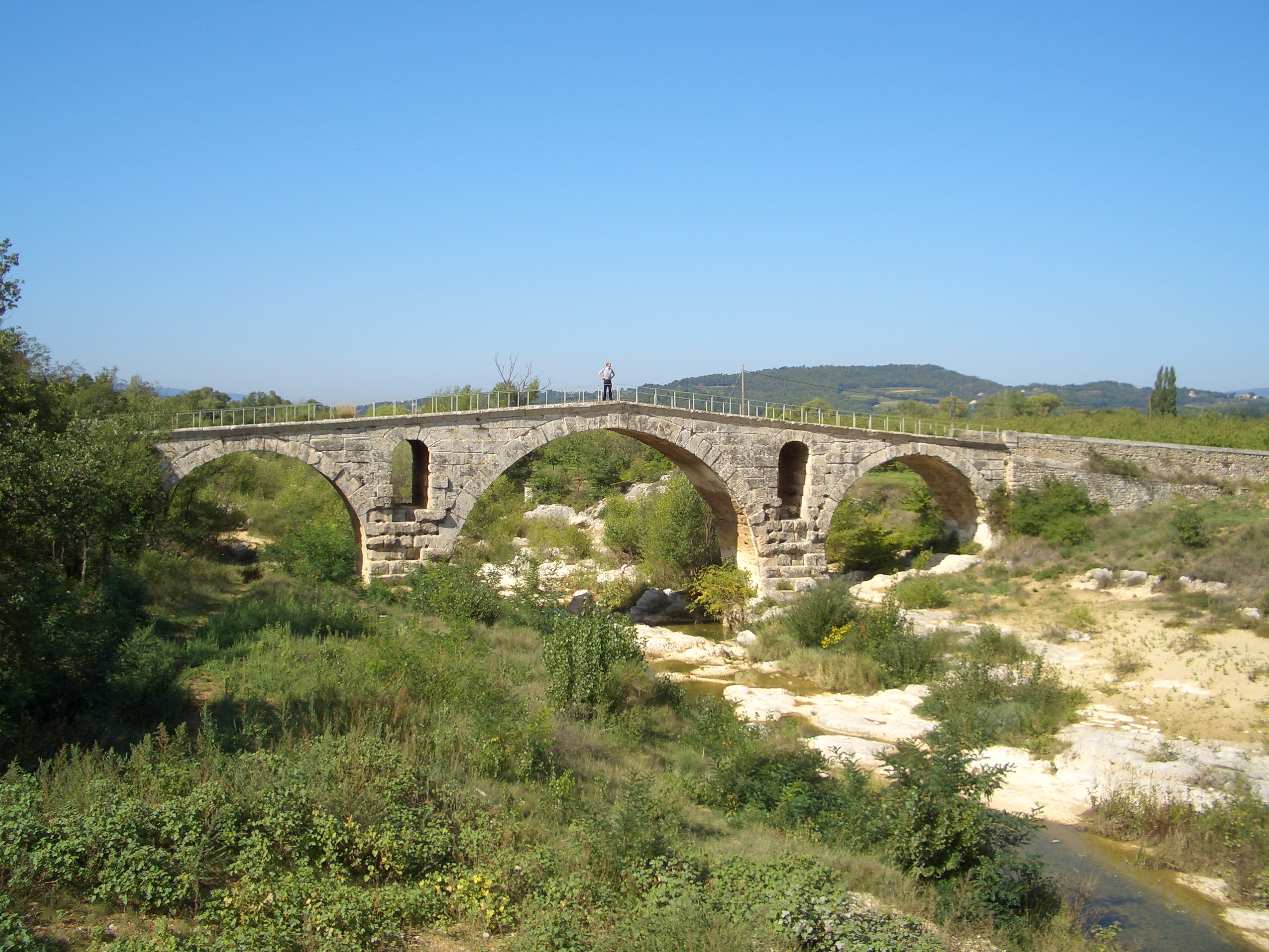 Pont Julien, Provence